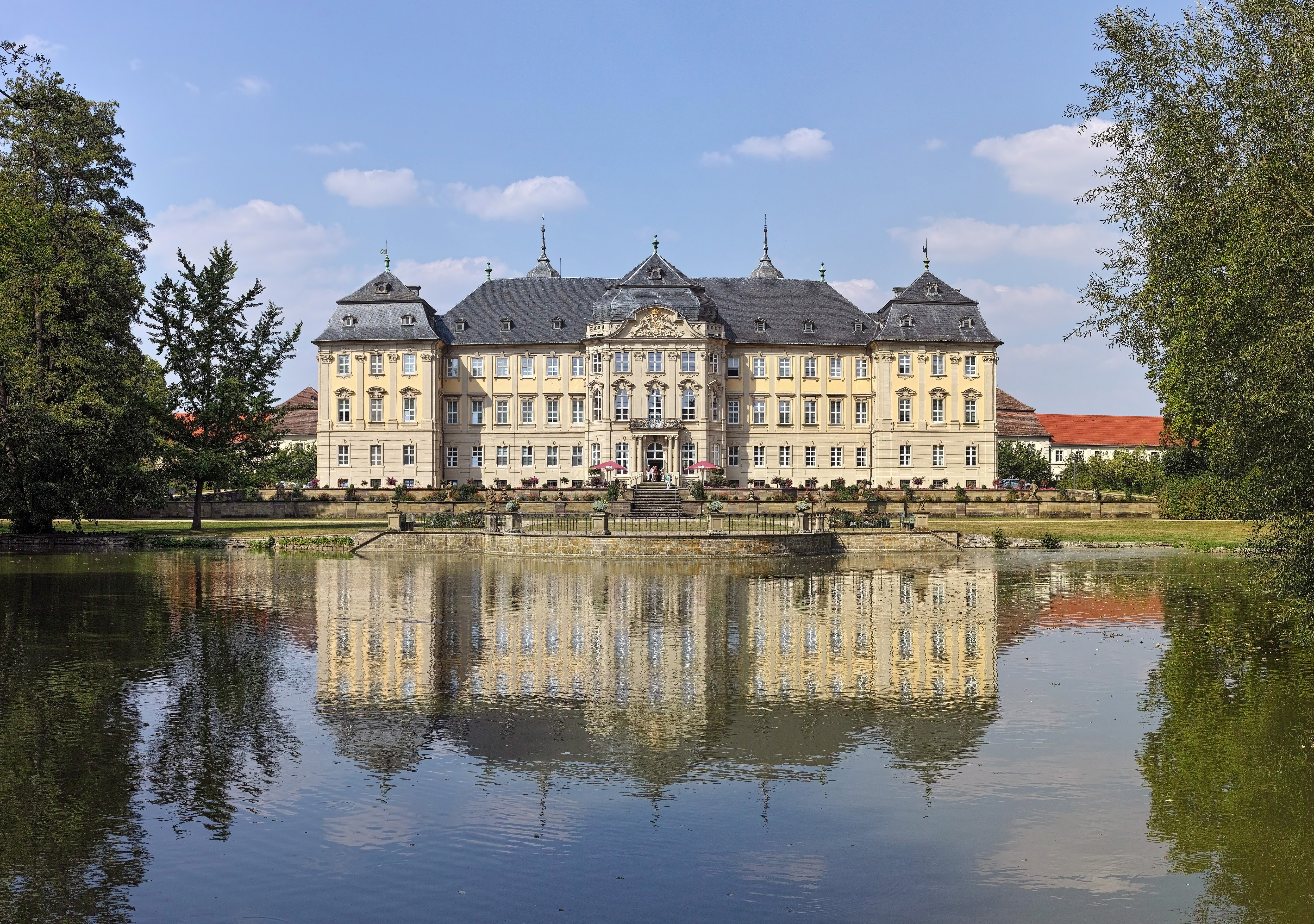 Das Schloss Werneck liegt in Werneck im unterfränkischen Landkreis Schweinfurt. Das Schloss wurde in den Jahren 1733 bis 1745 durch Balthasar Neumann als Sommerresidenz erbaut. Seit 1855 wird das Schloss als Heil- und Pflegeanstalt genutzt. Diese Datei wurde mit Hugin erstellt